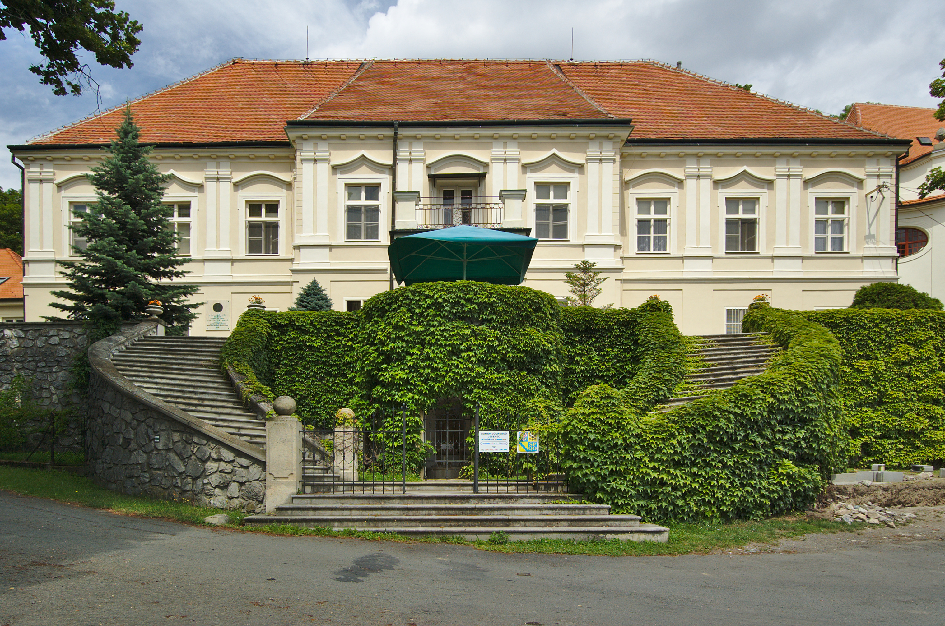 Zámek Jesenec, okres Prostějov